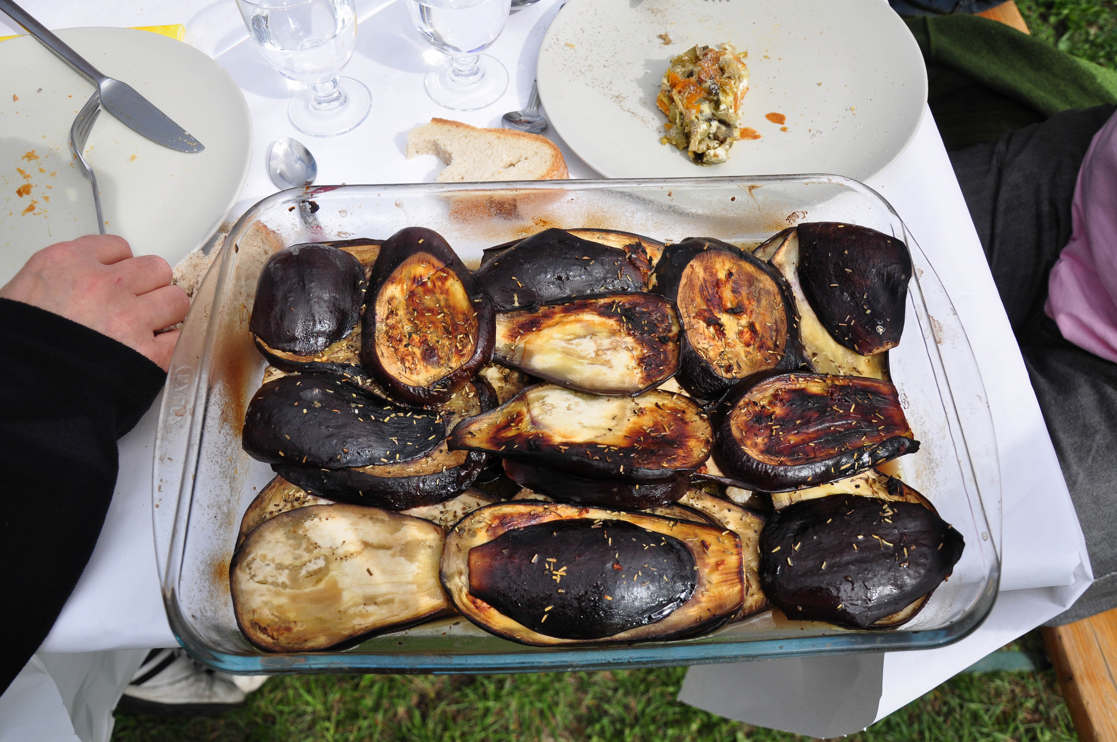 Aubergines frites